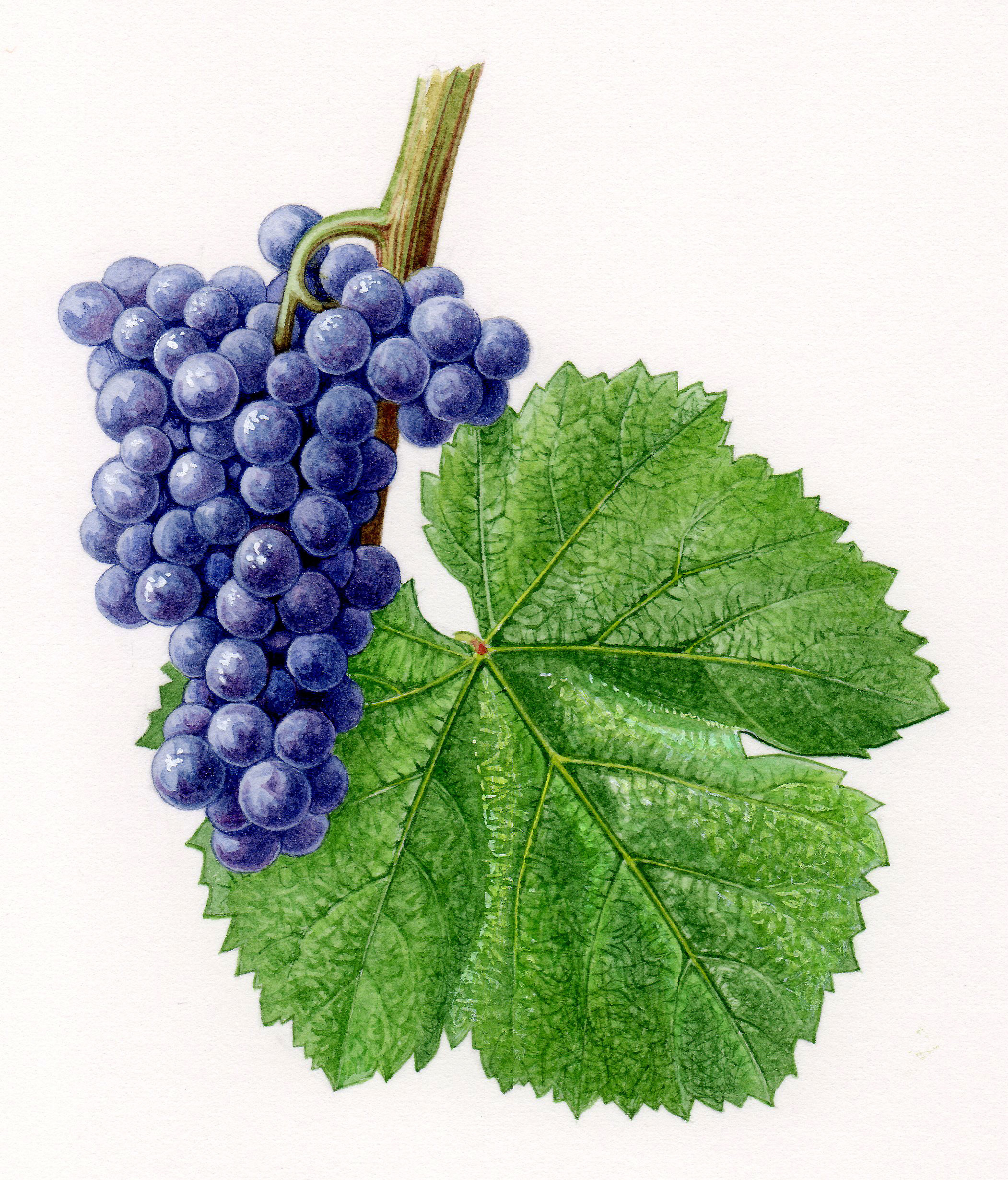 aquarelle originale des cépages de France (2001)